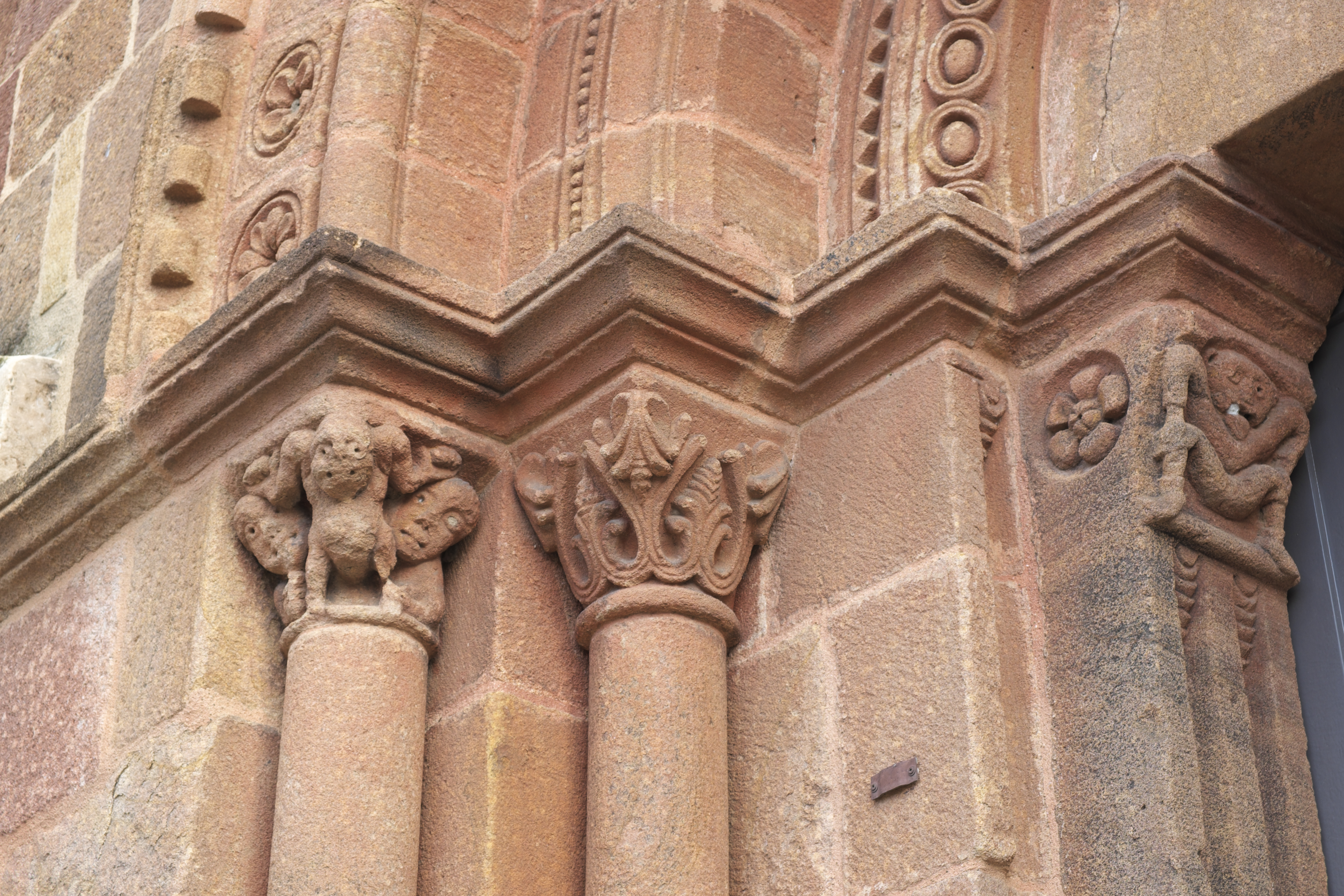 Katholische Kirche Saint-Pierre in Yzeure im Département Allier (Auvergne-Rhône-Alpes/Frankreich), Kapitell am Portal